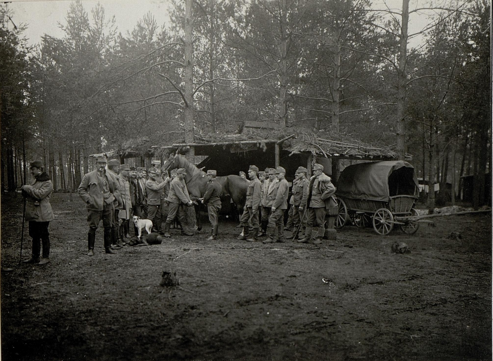 Vermutlich eine Fotostrecke einer Honvedeinheit mit Einsatzgebiet in Galizien